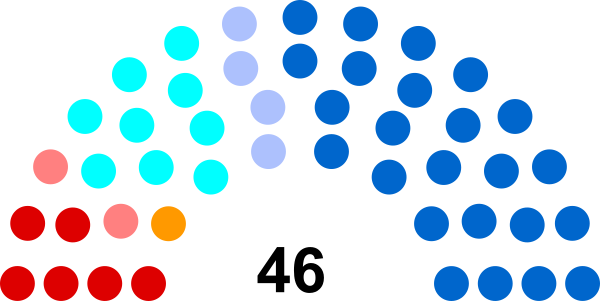 Composition en hémicycle du conseil départemental des Hauts-de-Seine suite aux élections départementales françaises de 2015. PCF: 5 sièges FASE: 1 siège PS: 2 sièges MoDem: 1 siège UDI: 9 sièges DVD: 4 sièges LR: 24 sièges